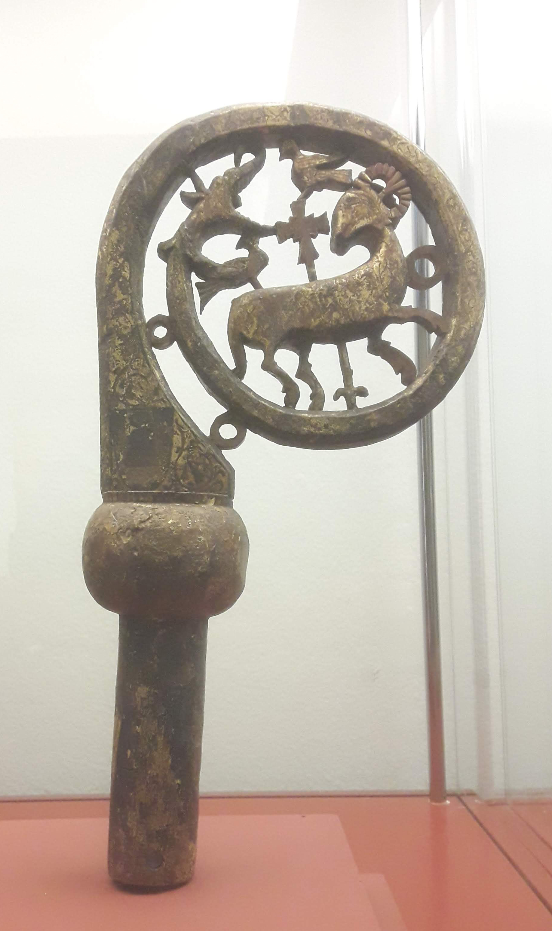 Bàcul de fusta policromada de l'abat Guerau de Clasquerí del monestir de Sant Cugat del Vallès, de cap al 1290. Museu Diocessà de Barcelona